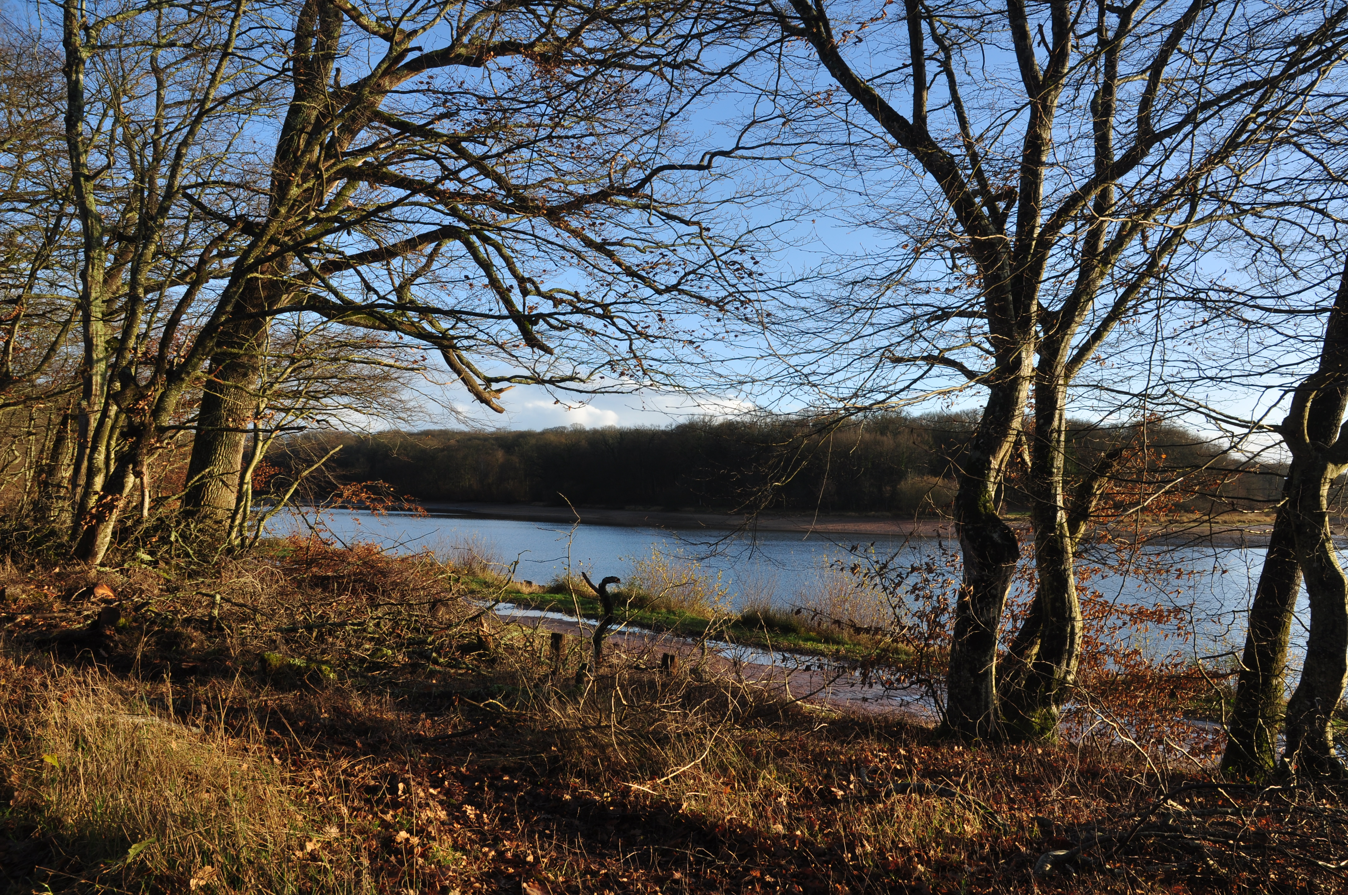 Cette photo représente l'étang . Nous sommes en décembre 2011 , fin d'après midi. Au fond, au Sud le Rond des pêcheurs.